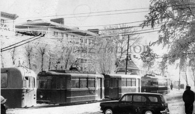 Tramvay_житомир.jpg: трамваї в житомирі